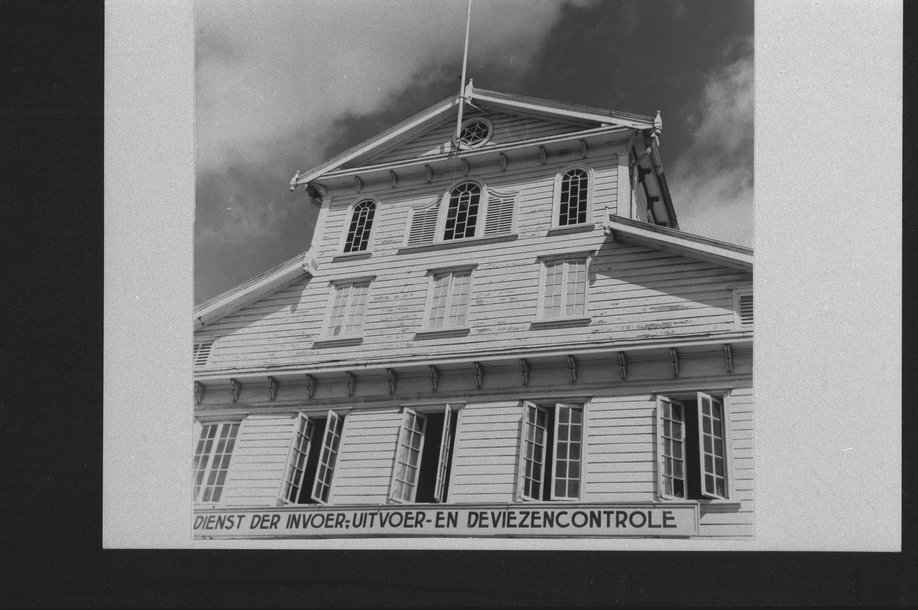 Waterkant 84, bovendeel voorgevel, detailOnderwerp: voorgevels